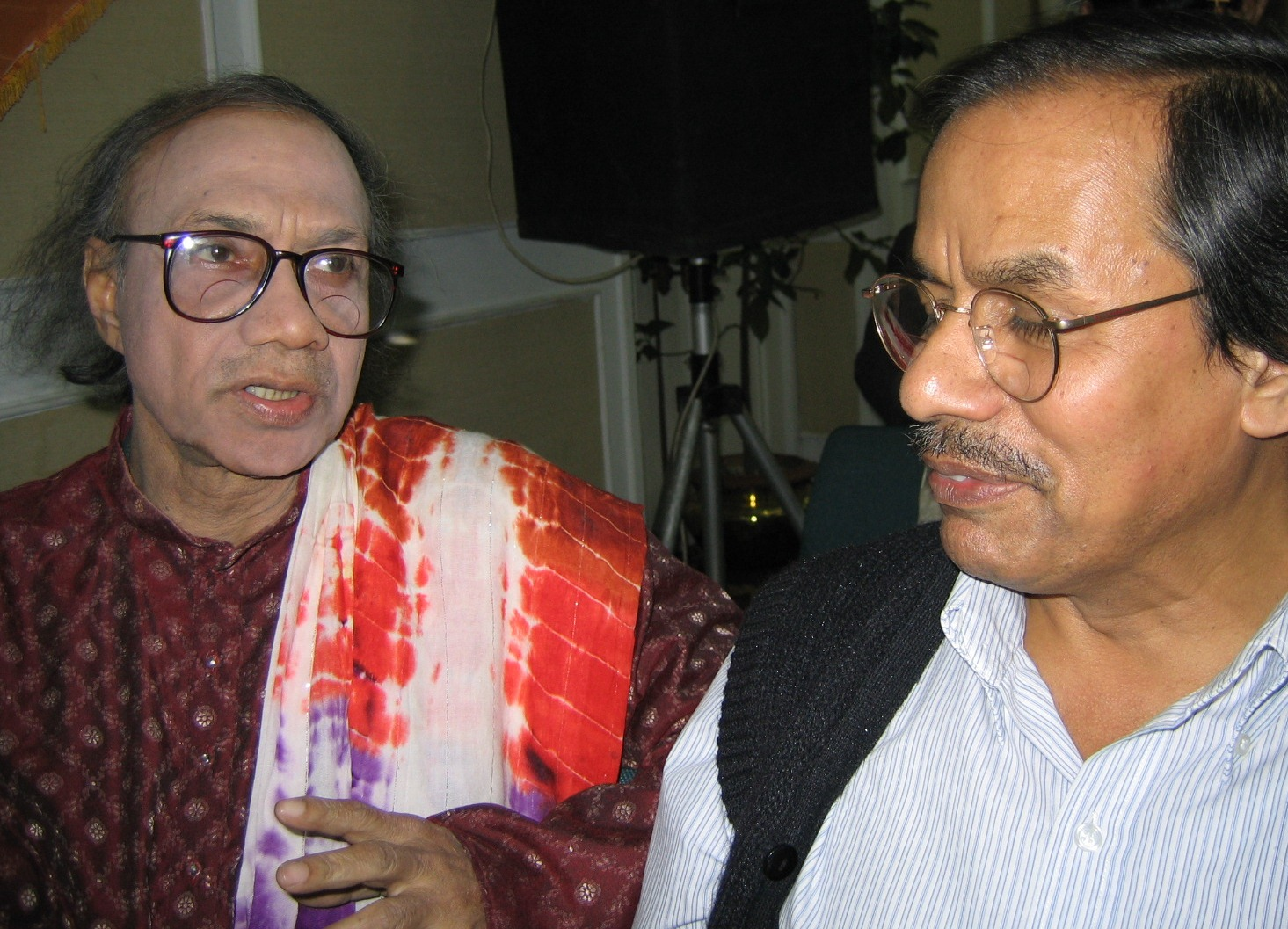 প্রথম আলো বর্ষসেরা গ্রন্থ পুরষ্কার বিতরণী অনুষ্ঠানে দুই বিচারক আবদুল মান্নান সৈয়দ ও সৈয়দ মনজুরুল ইসলাম।